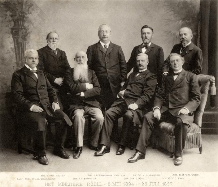 Groepsportret van het kabinet Röell (1894-1897) met: Staand vlnr Mr. Sam van Houten, Mr. J.P. Sprenger van Eyk, Ph. W. v.d. Sleyden, Jhr. H.M. v.d. Wyck, Zittend vlnr Luit. Gen. C.D.H. Schneider, Mr. J.H. Bergsma, Jhr. Mr. Joan Röell, Mr. W. v.d. Kaay. Ne